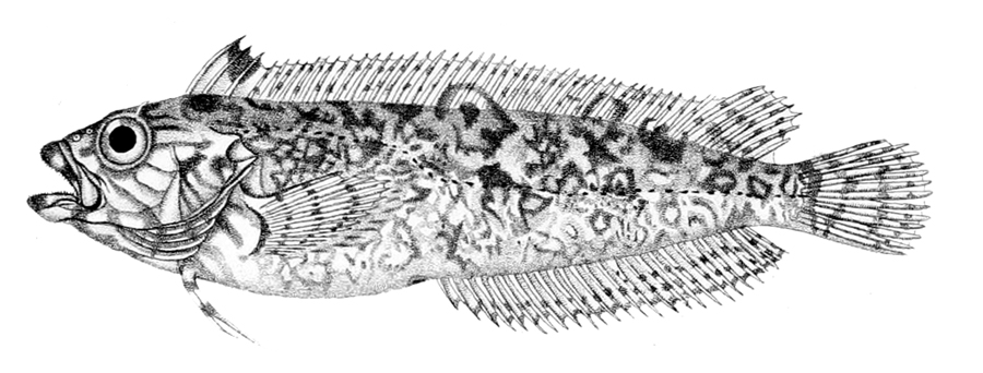 Clinus superciliosus